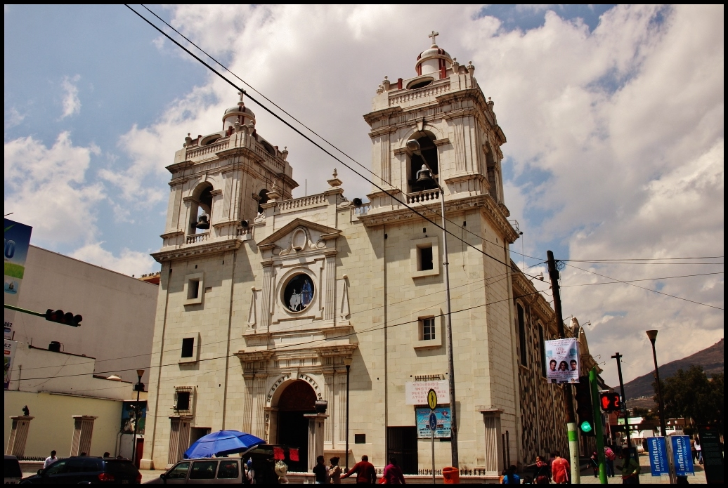 Basilica de Santa María de Guadalupe (Pachuca) Estado de Hidalgo,México